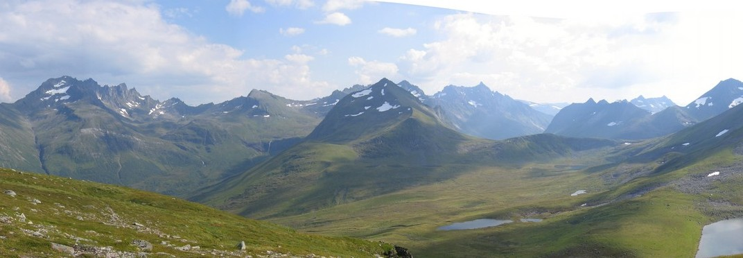 Sunnmørsalpane, Ørsta, Norway